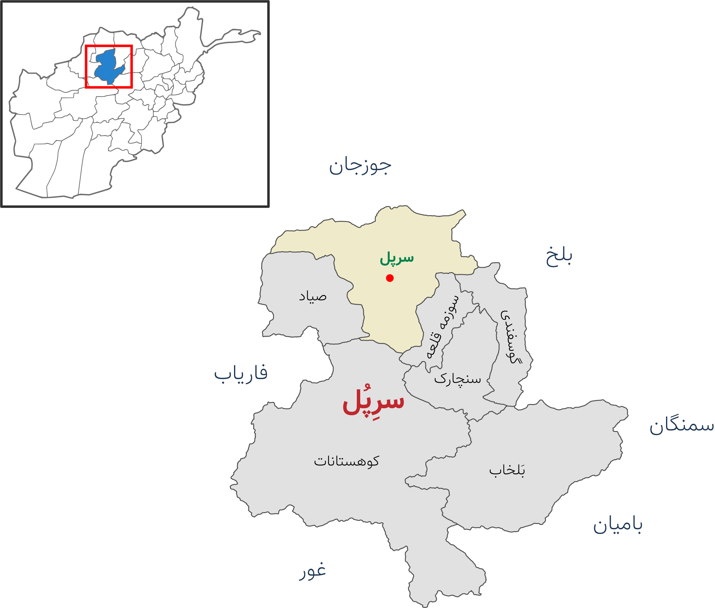 نقشه ولایت سرپل